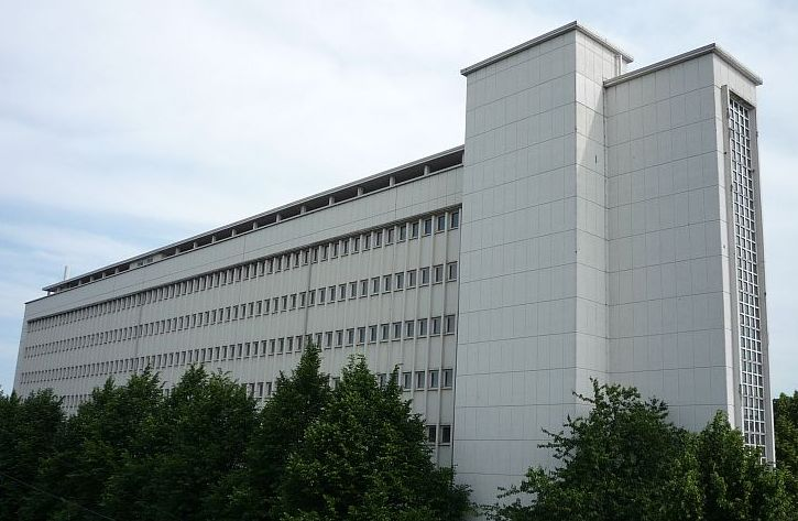 ehemalige Französische Botschaft in Saarbrücken, heute Ministerium für Bildung, Familie, Frauen und Kultur des Saarlandes (Nordfassade)